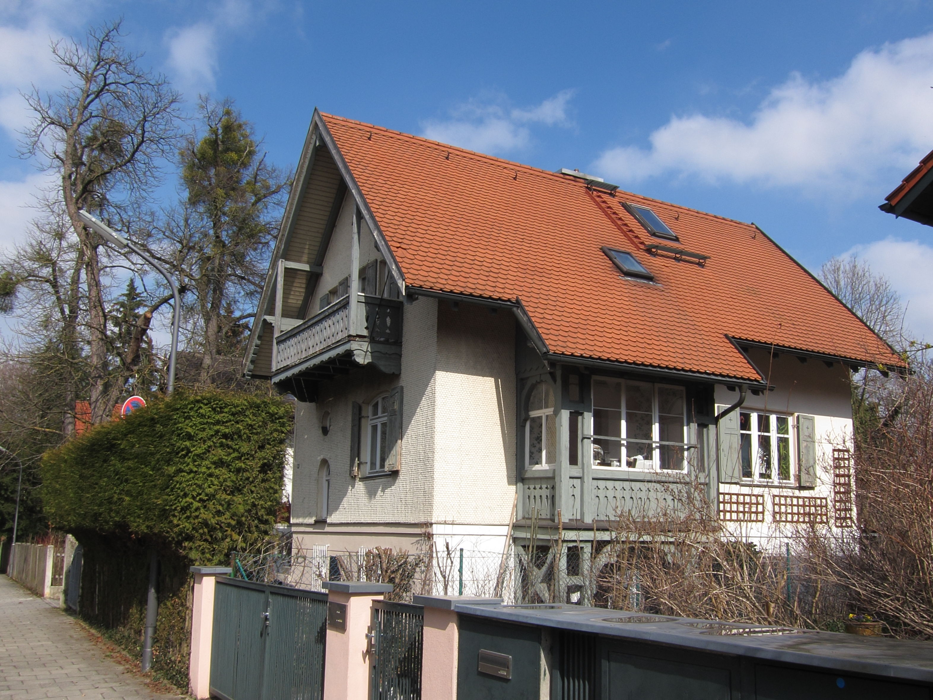 Oselstraße 36; Villa, Landhausstil, um 1893, aus dem Büro August Exter.